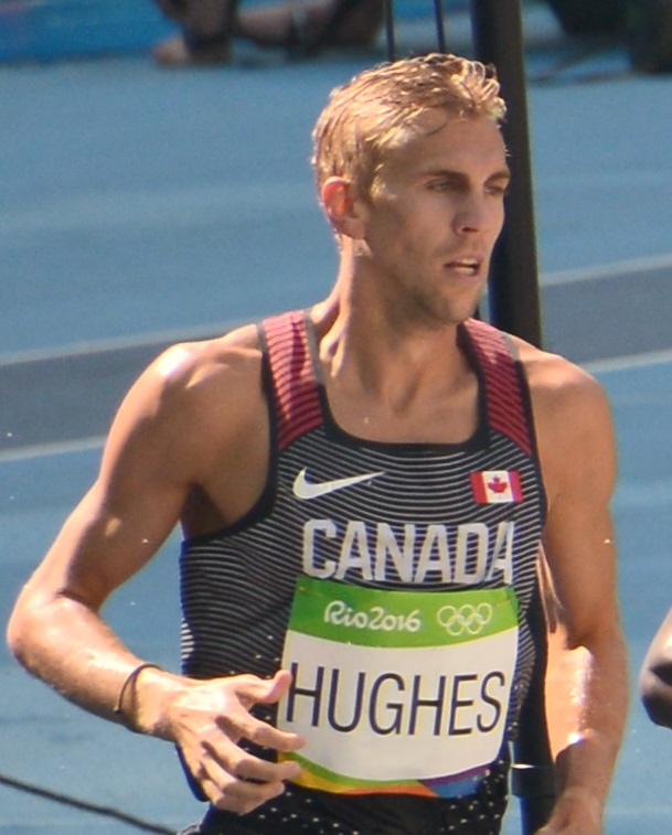 Matthew Hughes dans sa série de 3000m steeple aux jo de Rio, 2016